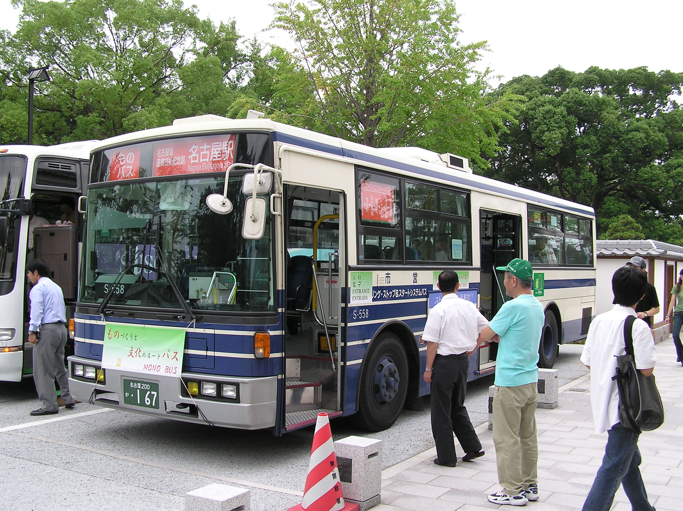 名古屋市交通局が運行していた「ものづくりと文化のルートバス」（通称ものバス）の「MONO4 徳川園（徳川美術館・蓬左文庫）」停留所にて一時停車中のバス